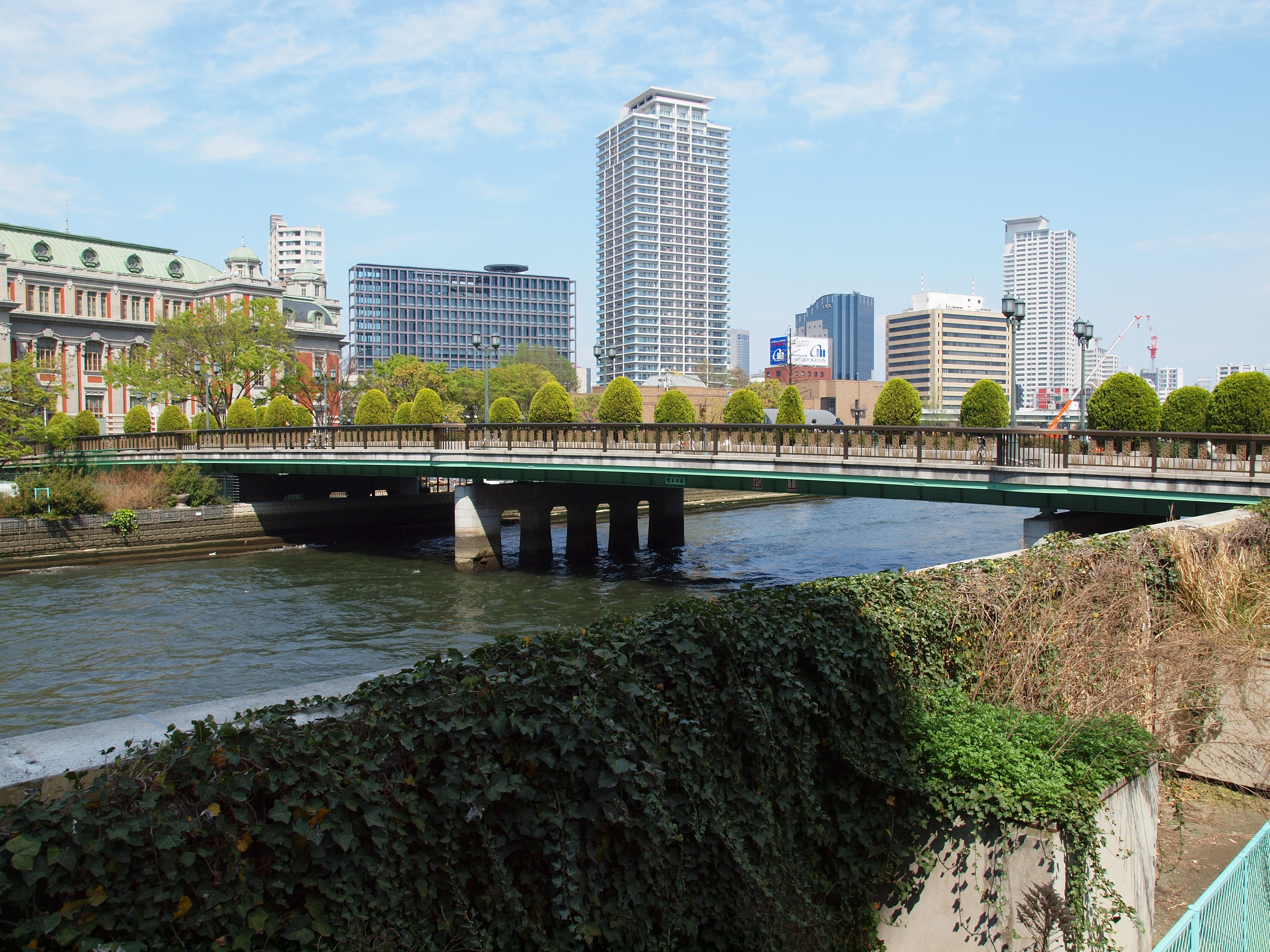 栴檀木橋（大阪市中央区-北区） 2009年4月撮影。 機材：E-30 撮影者：Kansai explorer